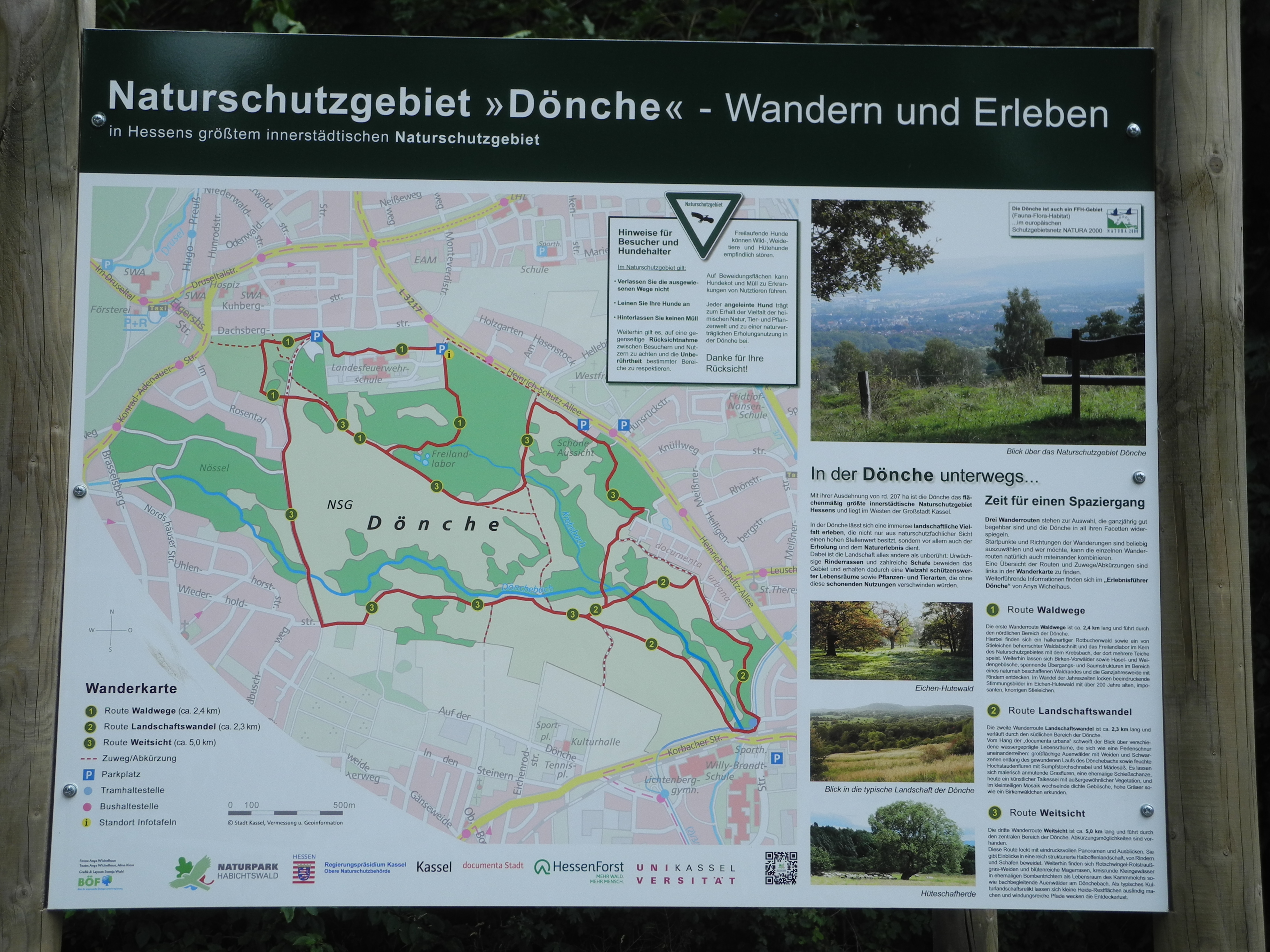 Naturschutzgebiet im Regierungsbezirk Kassel 1611004. „Dönche“ eine Offenlandfläche mit Wald im Südwesten des Stadtgebietes von Kassel, Hessen, Deutschland. Karte der 2019 neu ausgewiesenen 3 Rundwege in der Dönche, am Wanderparkplatz bei der Landesfeuerwehrschule.